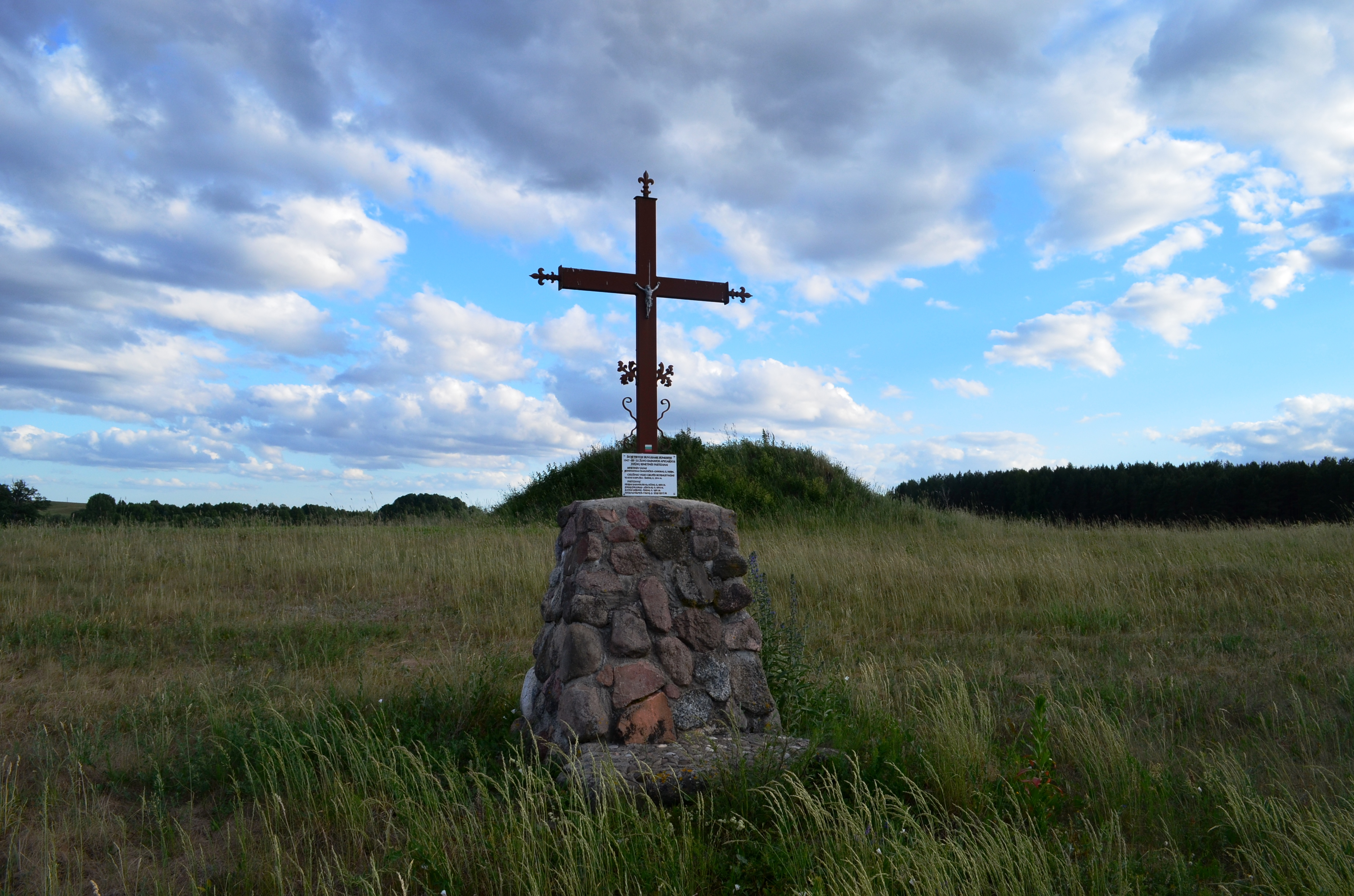 Savulkos, partizanų atminimo kryžius, Varėnos raj.